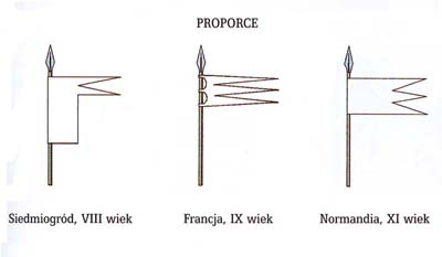 Proporce: Siedmiogrodu (VIII wiek), Francji (IX wiek), Normandii (XI wiek)